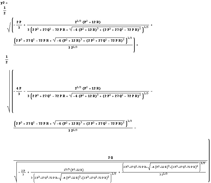 jedno z řešení kvartické rovnice